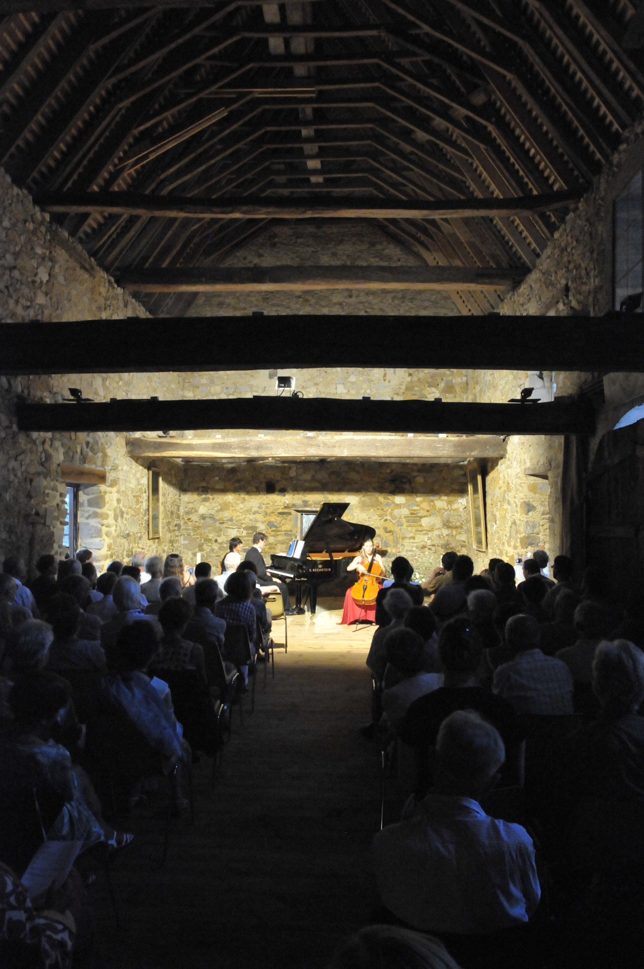 Konzert mit Nadège Rochat und Florian Noack in Château d´Orion 2011.jpg